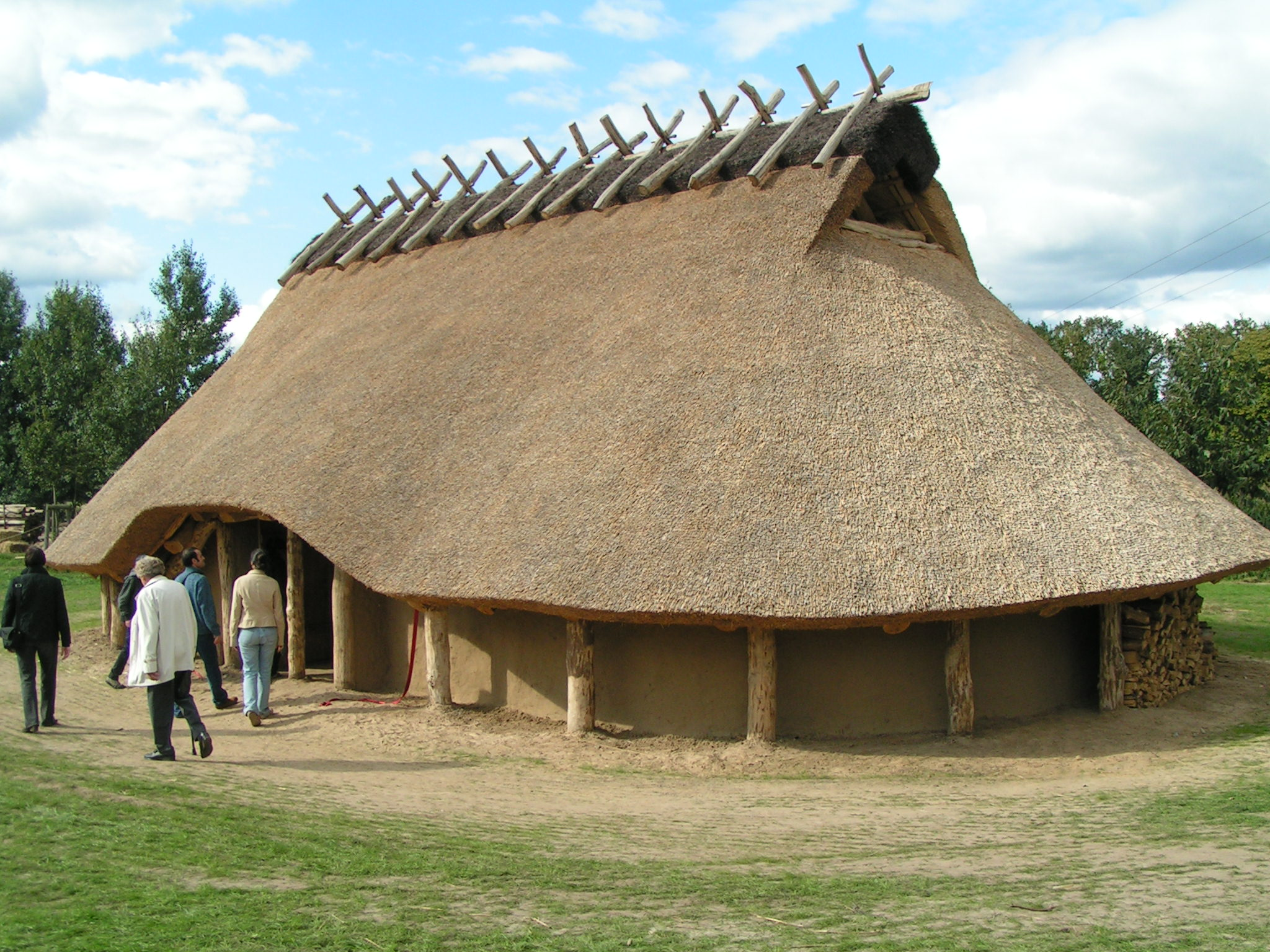 Eisenzeithaus Darpvenne.